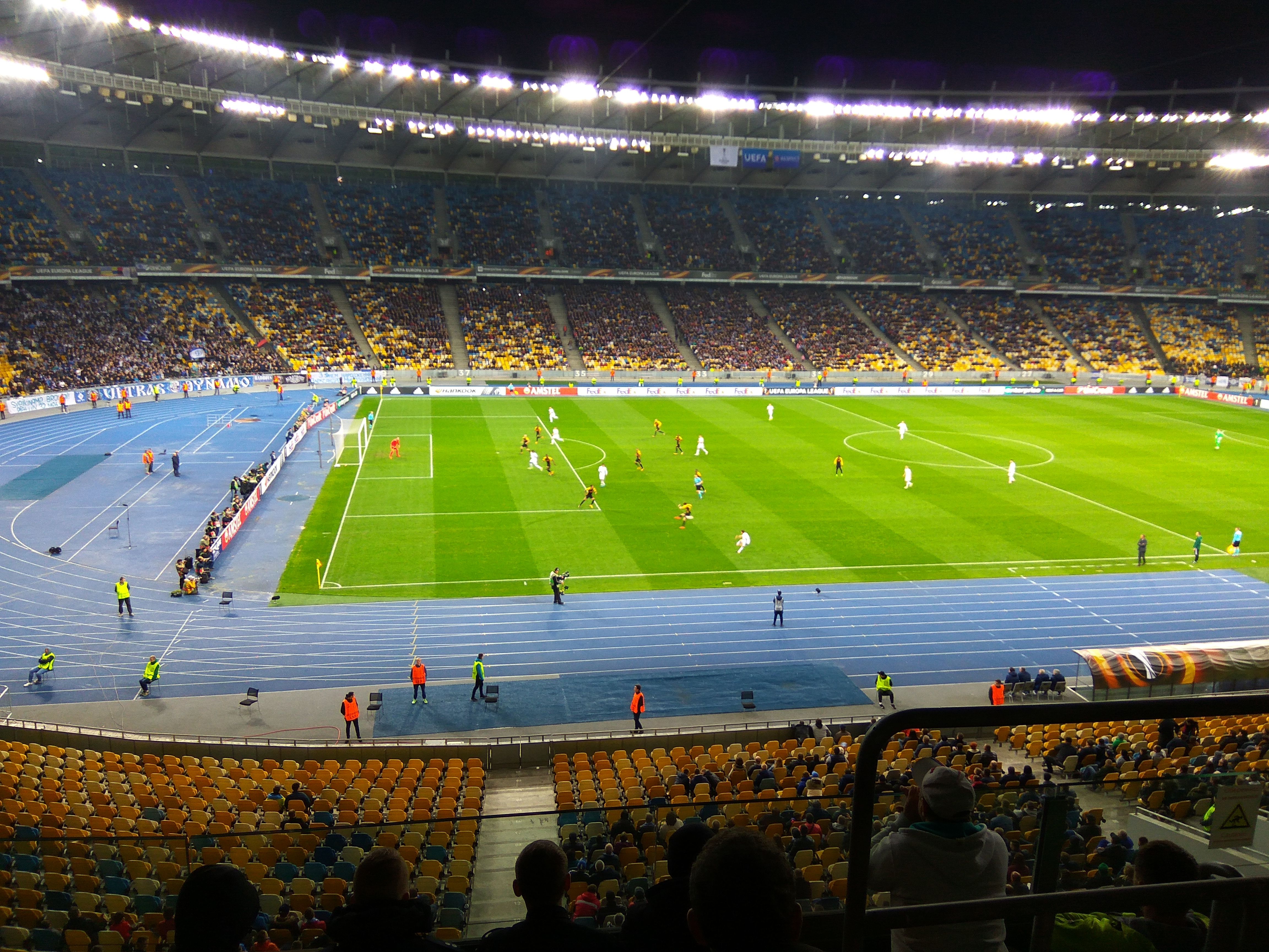 Ліга Європи УЄФА 2017-2018. Динамо (Київ) - Янг Бойз 2:2